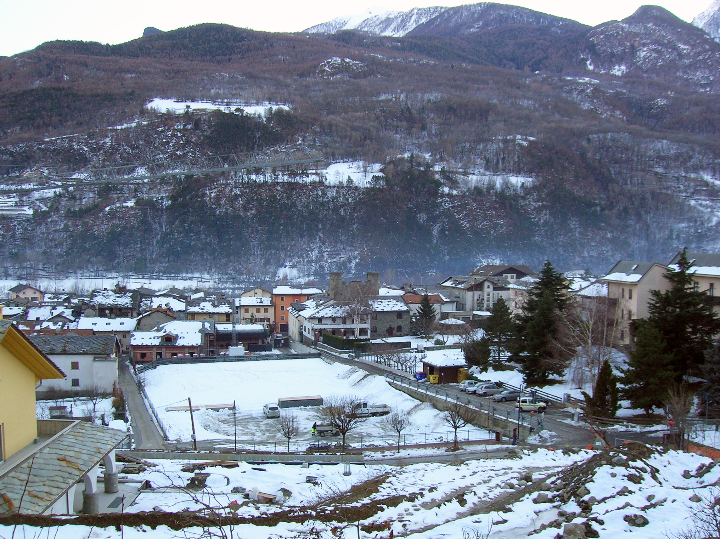 Castello di Pilato contestualizzato nel borgo di Nus visto dalla Chiesa parrocchiale di S. Iliario. Nus, Valle d'Aosta, Italia.